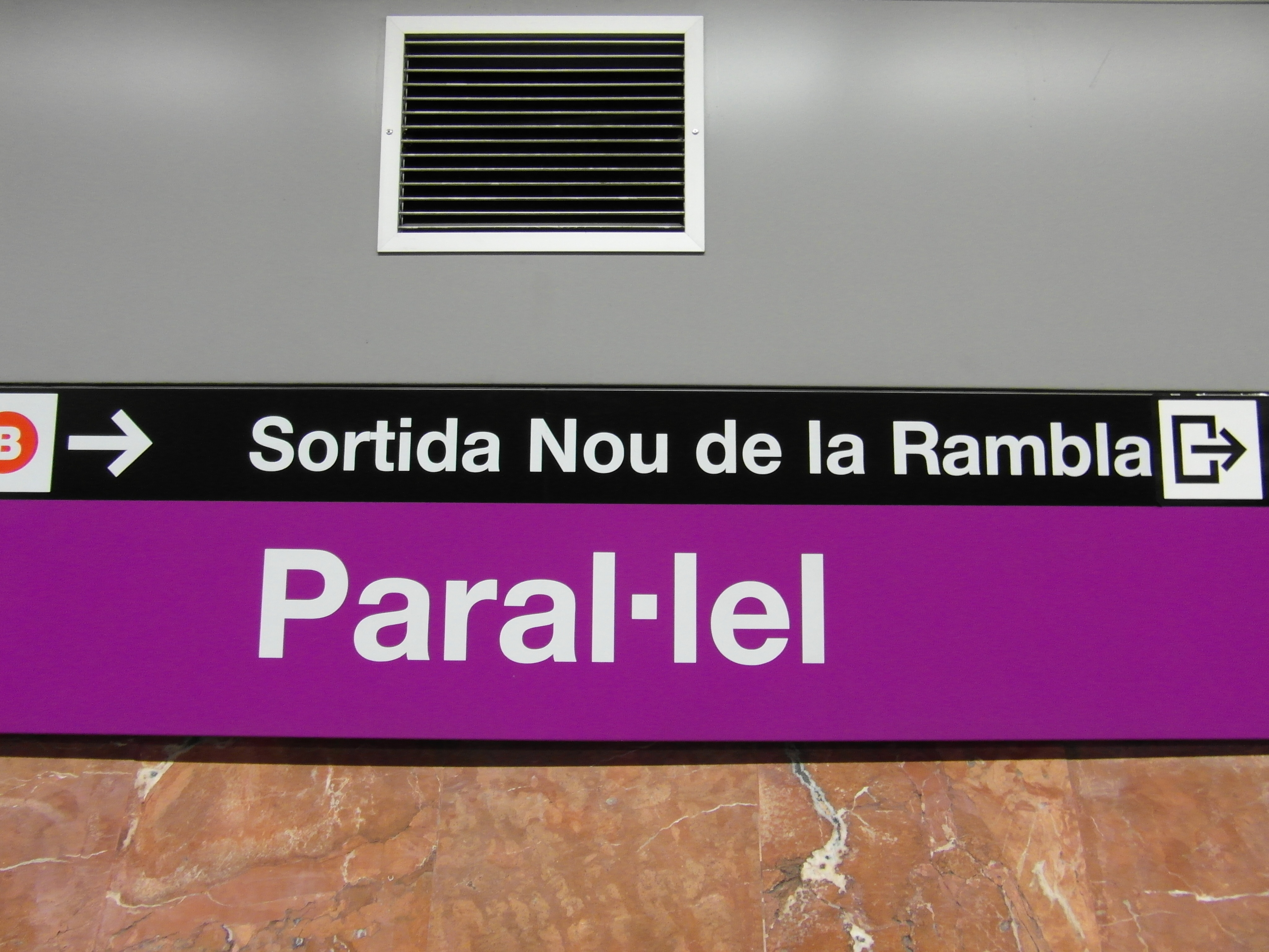 Barcelona - Estació de Paral·lel